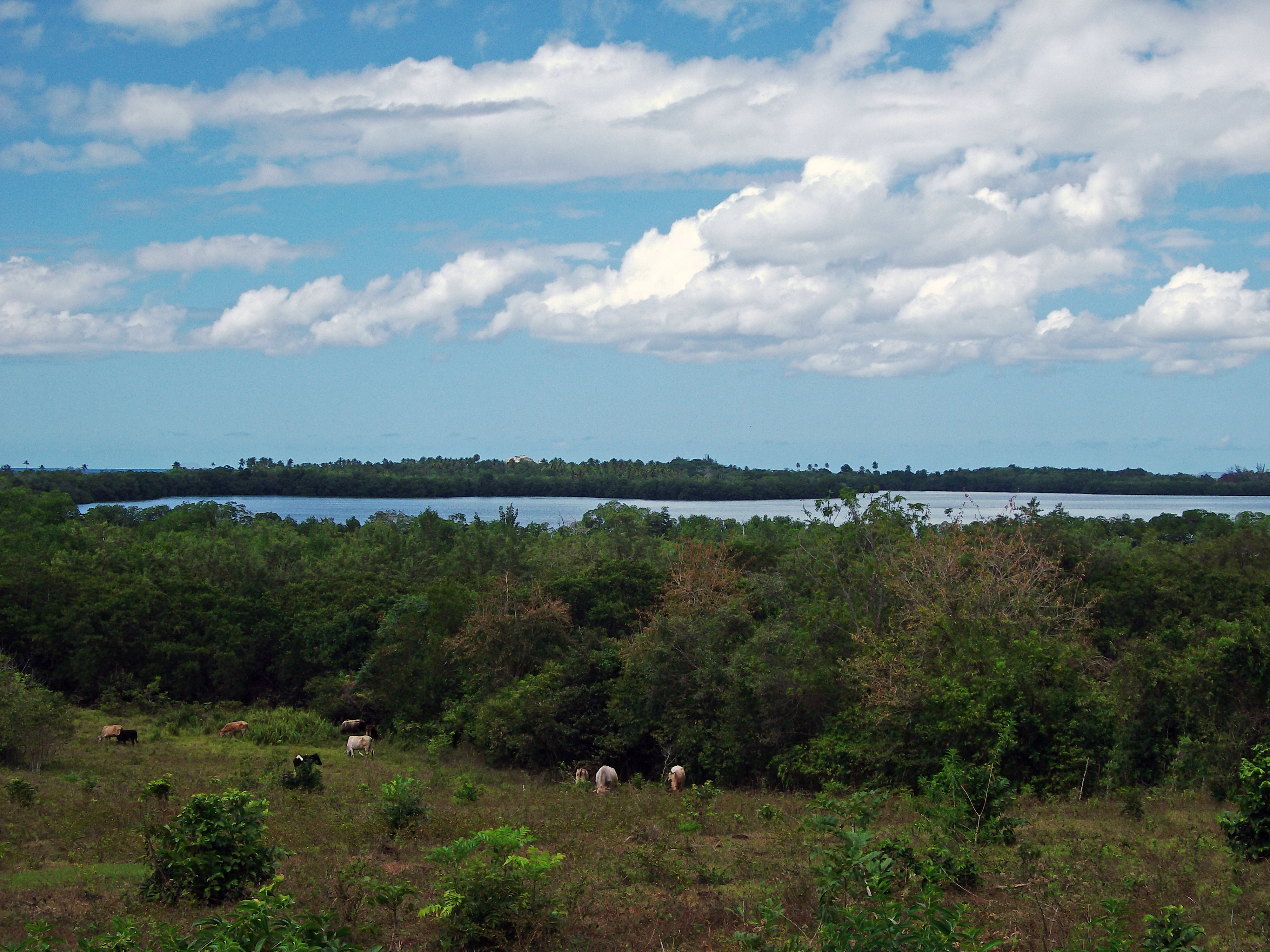 Laguna Joyuda